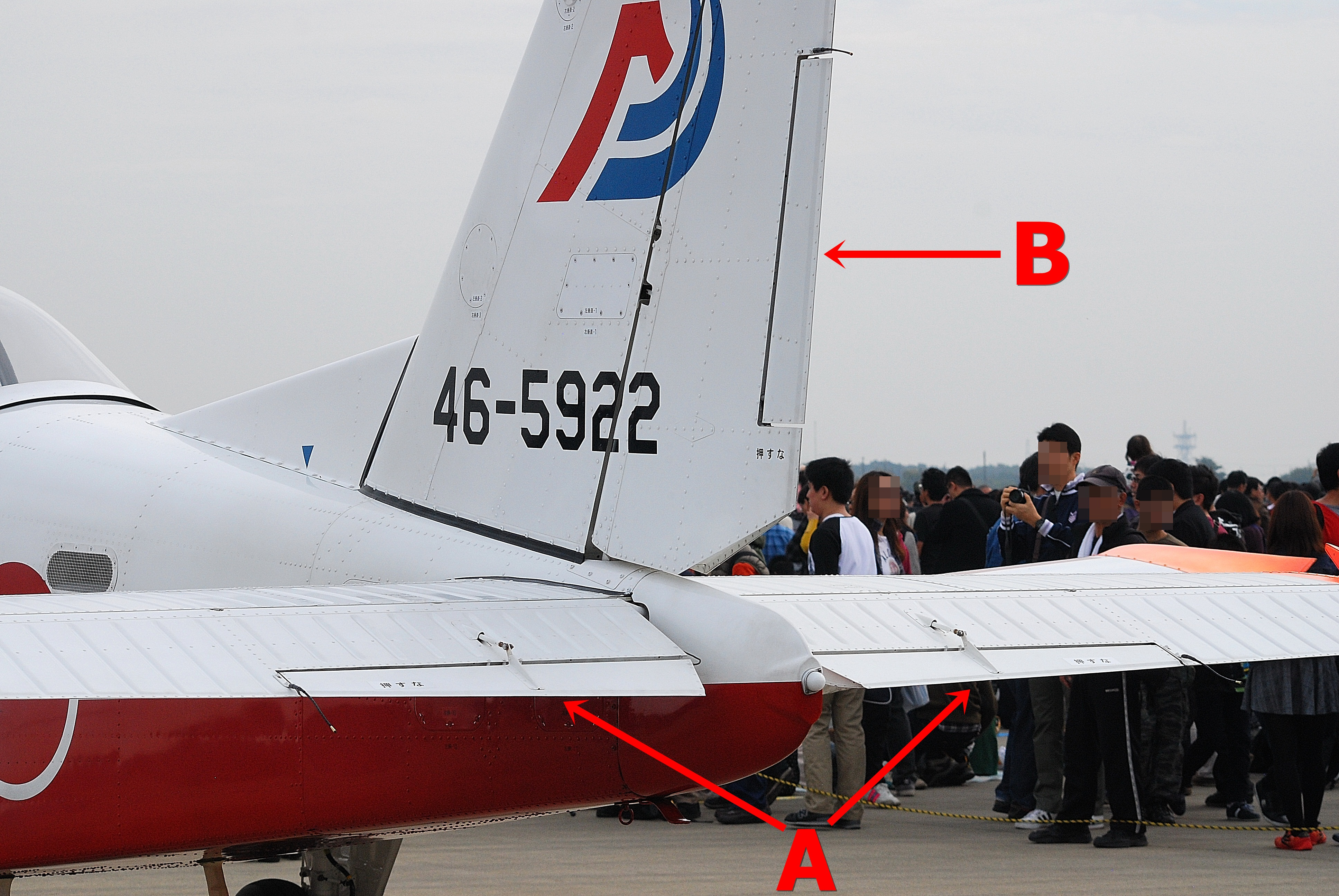 航空自衛隊T-7初等練習機の尾翼。A昇降舵のトリム・タブ、B方向舵のトリム・タブ。（2013年の入間基地航空際にて撮影）